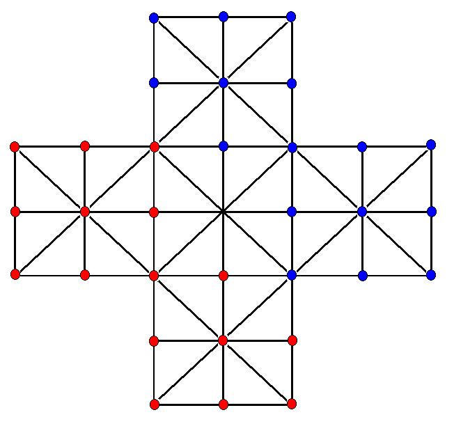 പടവെട്ടിനുപയോഗിക്കുന്ന കളം